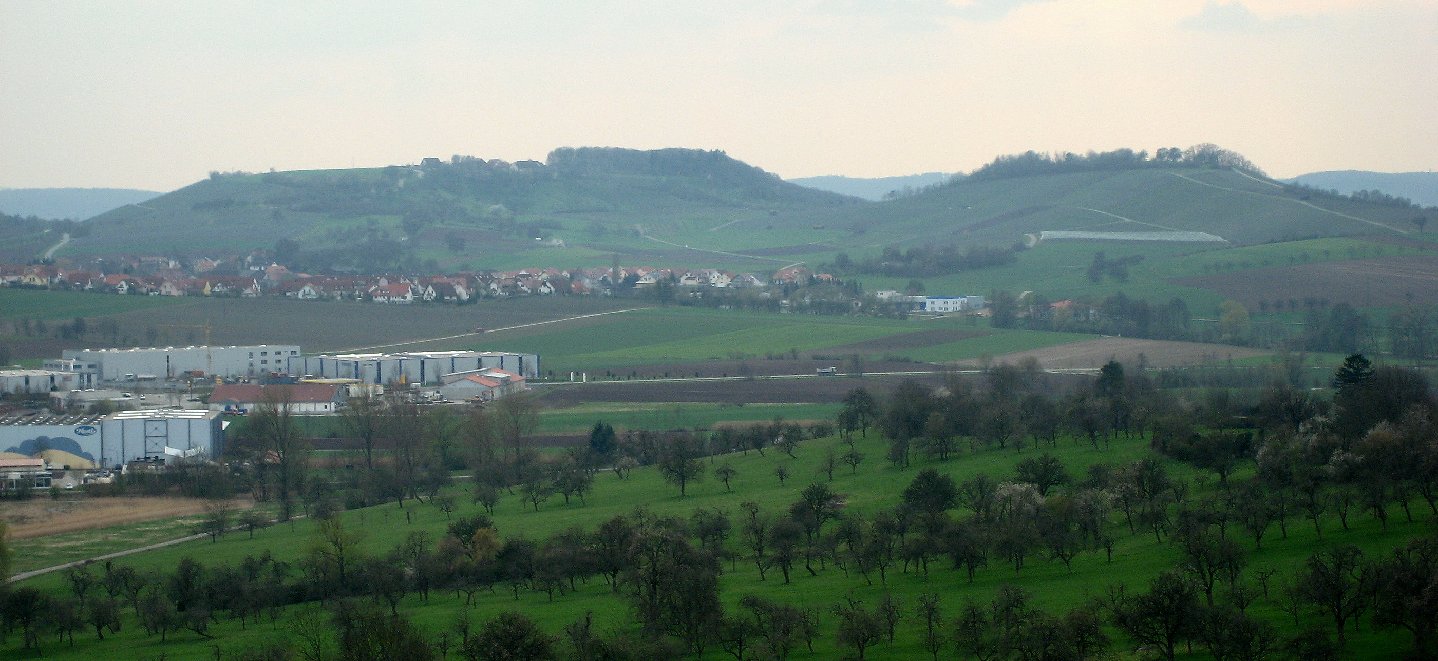 Öhringen - Lindelberg (links, zu Pfedelbach) und Golberg (zu Öhringen) aus östlicher Sicht